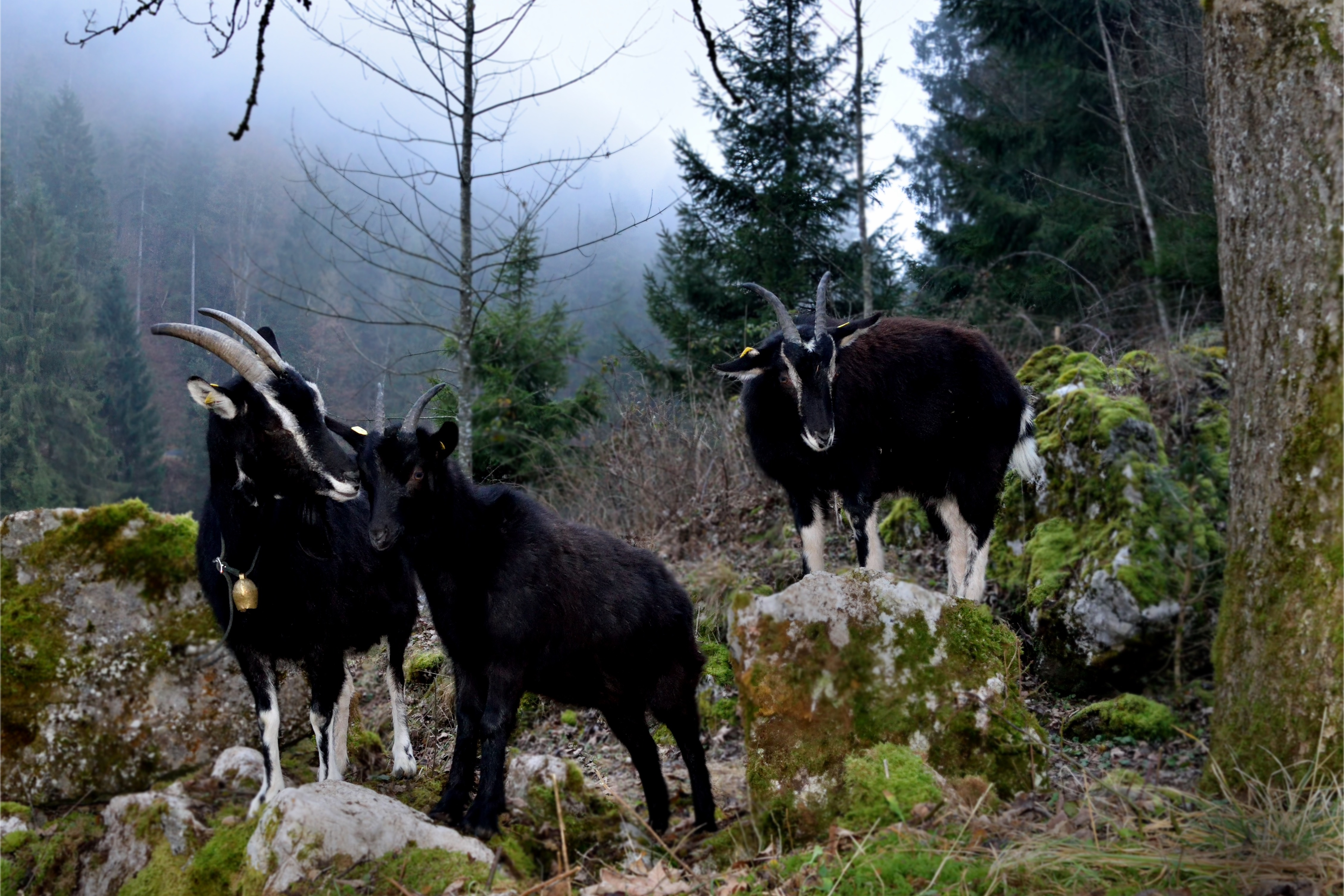 Pinzgauer Strahlenziege, Krapfengut